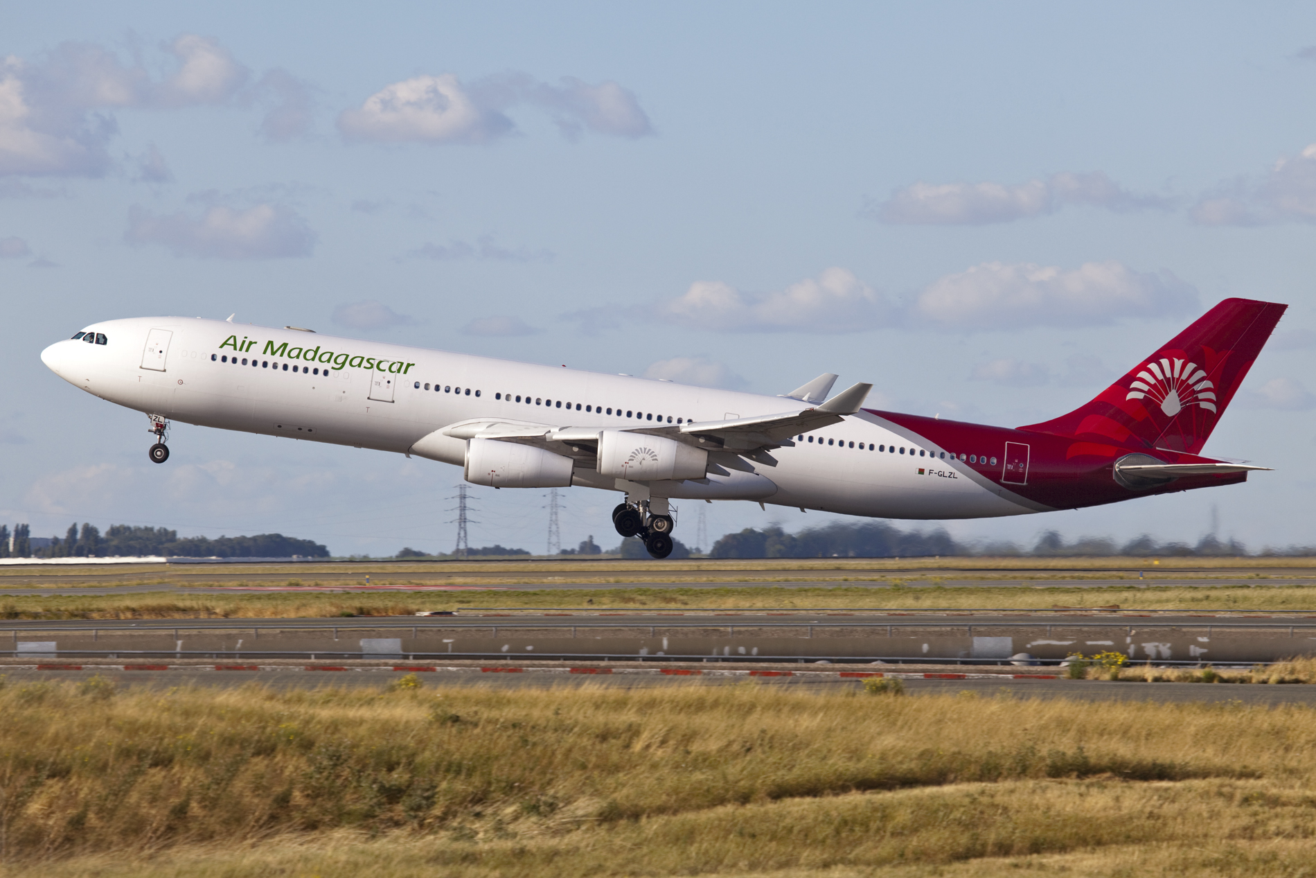 F-GLZL A340-300 Air Madagascar at Paris-CDG